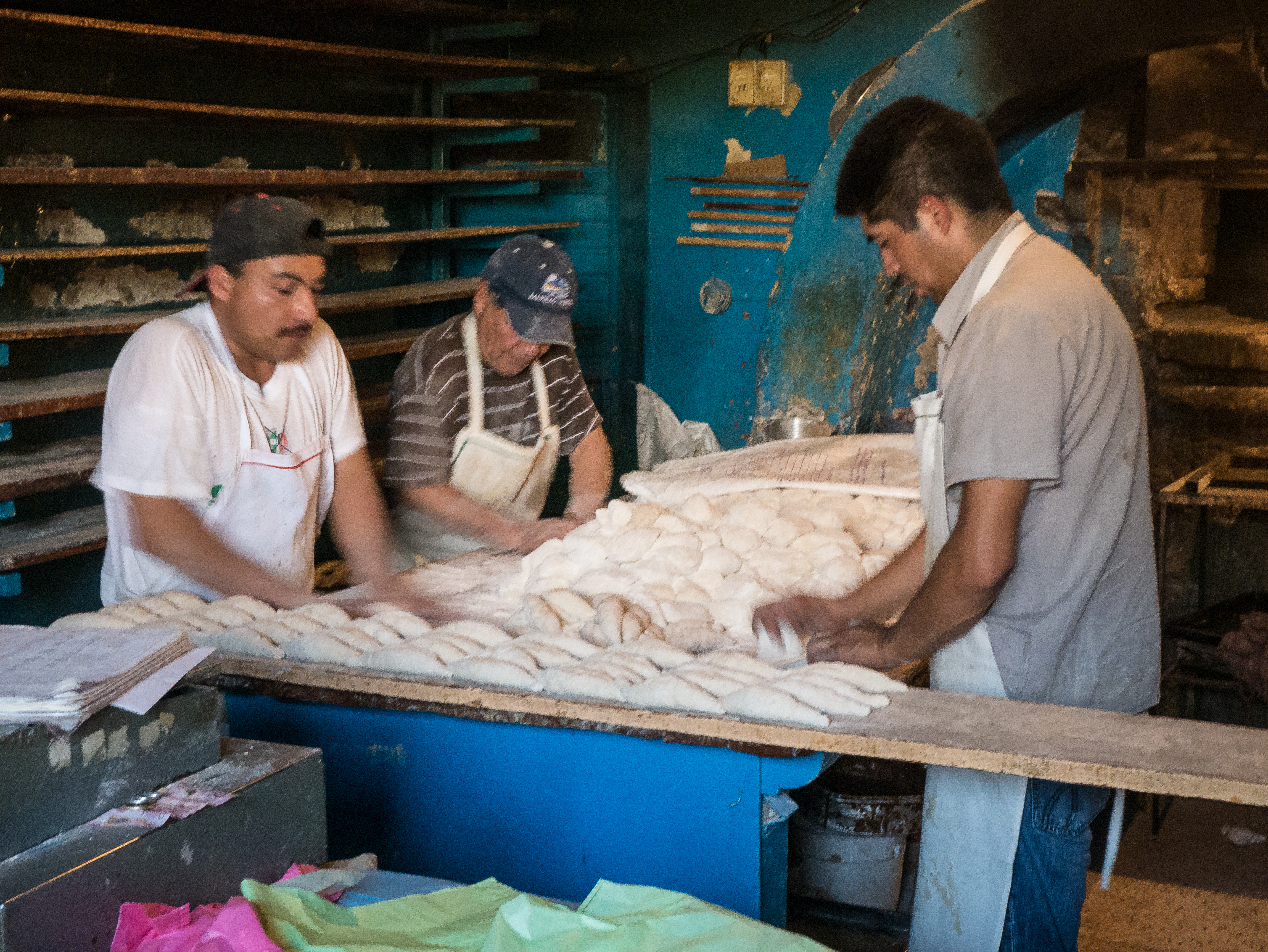 Elaboración de pastes